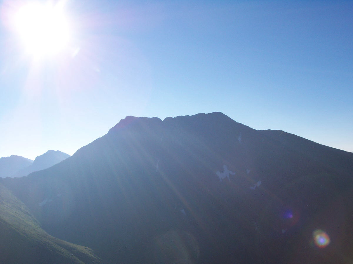 Moldoveanu